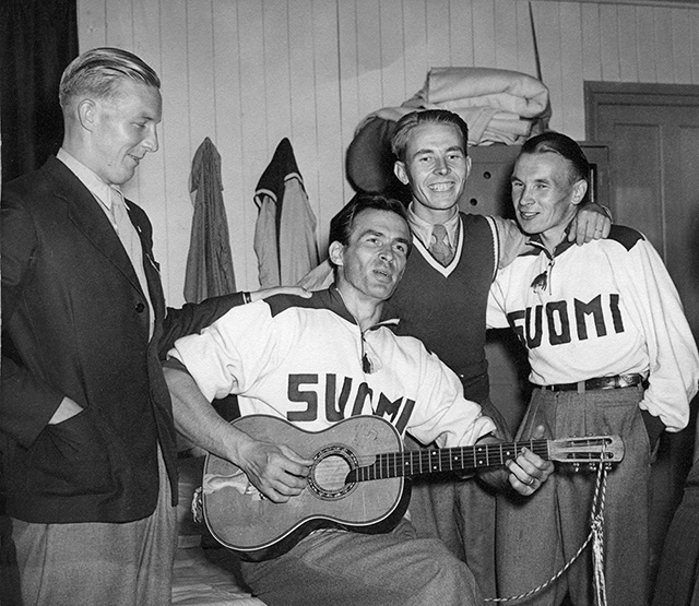 Kuuno Honkonen, Tapio Rautavaara, Pentti Siltaloppi and Salomon Könönen at the London Olympics